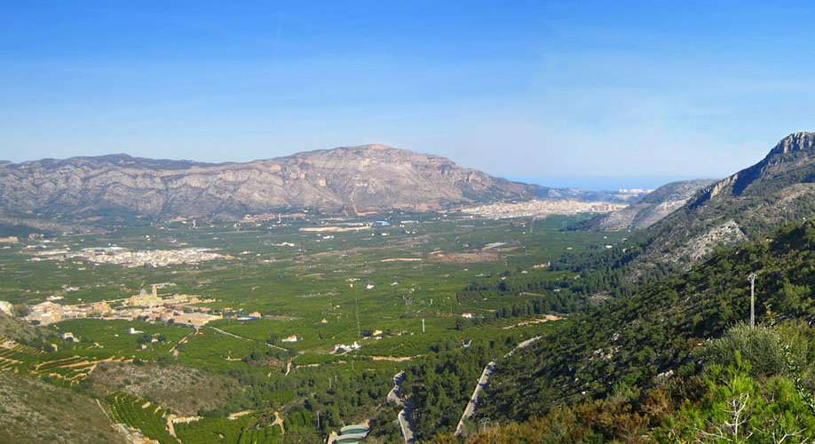 Panoràmica de la Valldigna, la Safor, País Valencià.